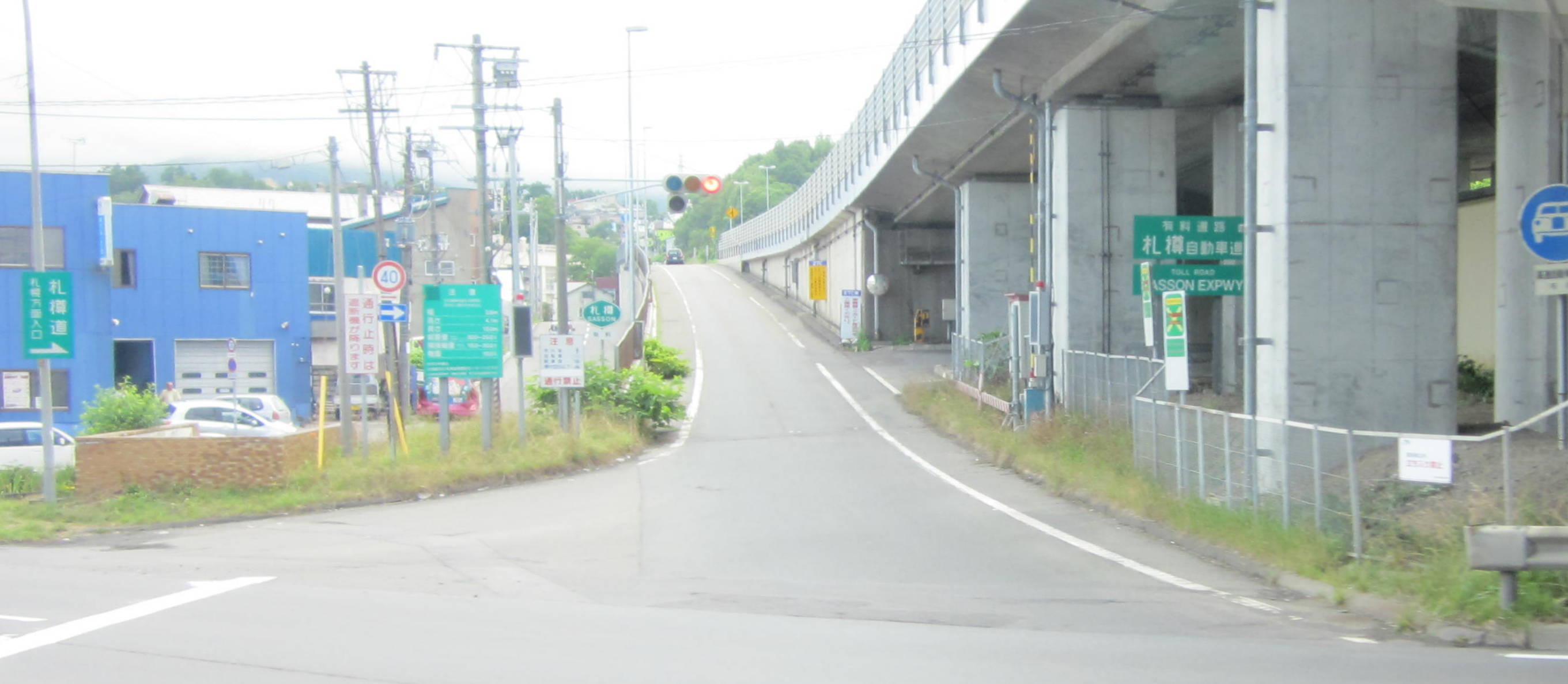 札樽自動車道 小樽インター 国道5号ランプ